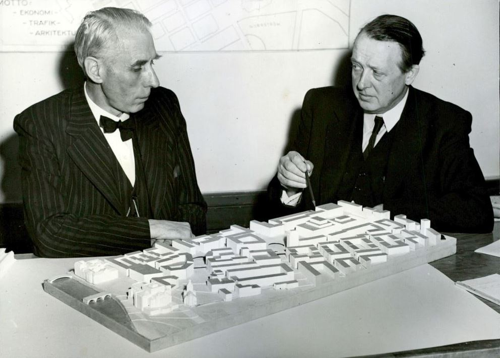 Ingenjörerna Thom Sjöwall och Ivan Lindgren presenterar sitt stadsplaneförslag för Nedre Norrmalm.